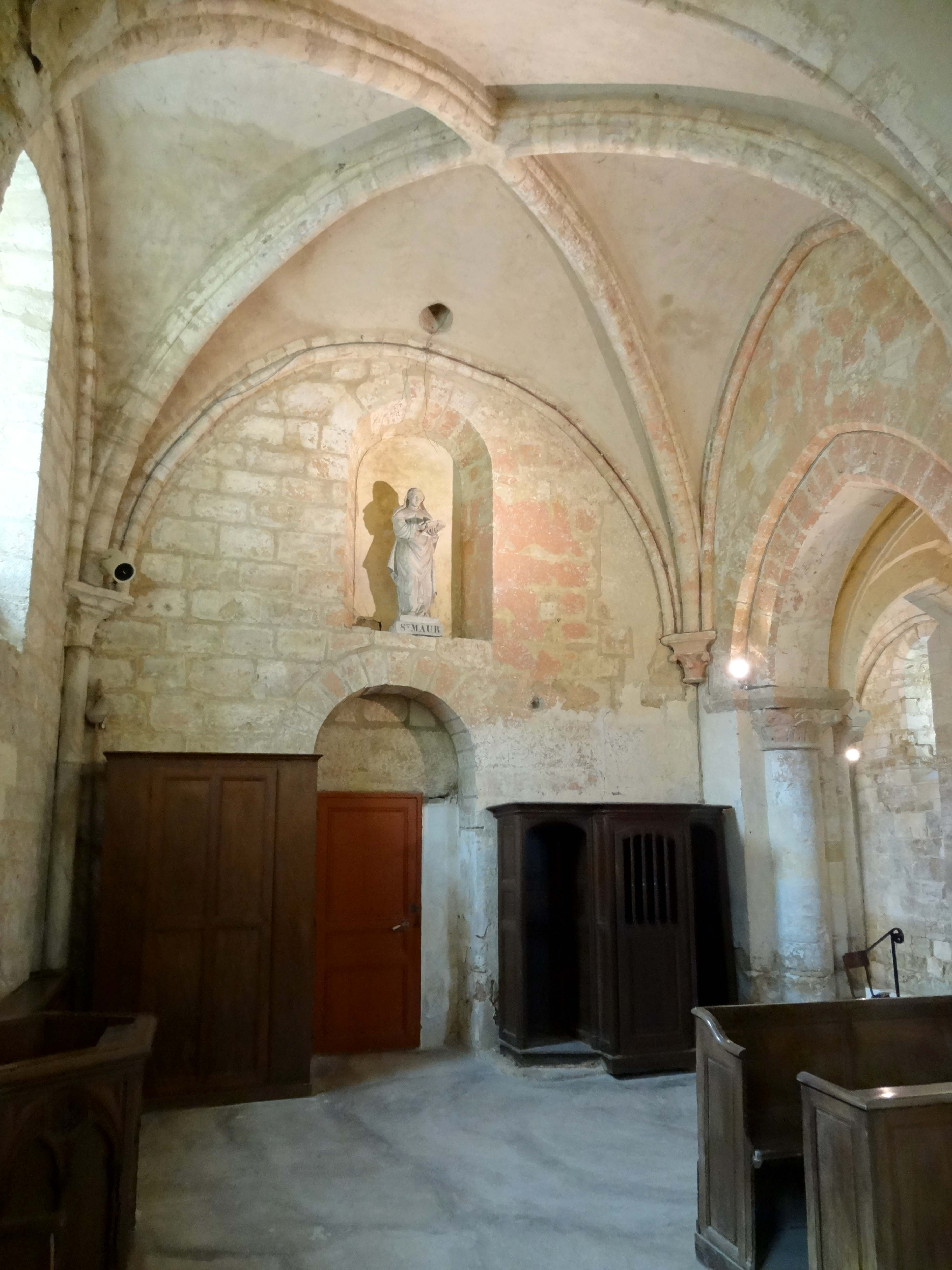 Intérieur de l'église - voir titre.